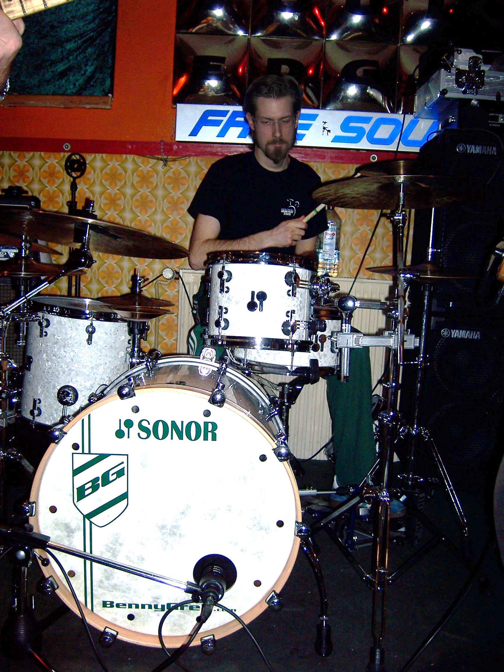 Der deutsche Schlagzeuger Benny Greb während eines Auftritts mit 3erGezimmeR im Souledge in Hamburg.